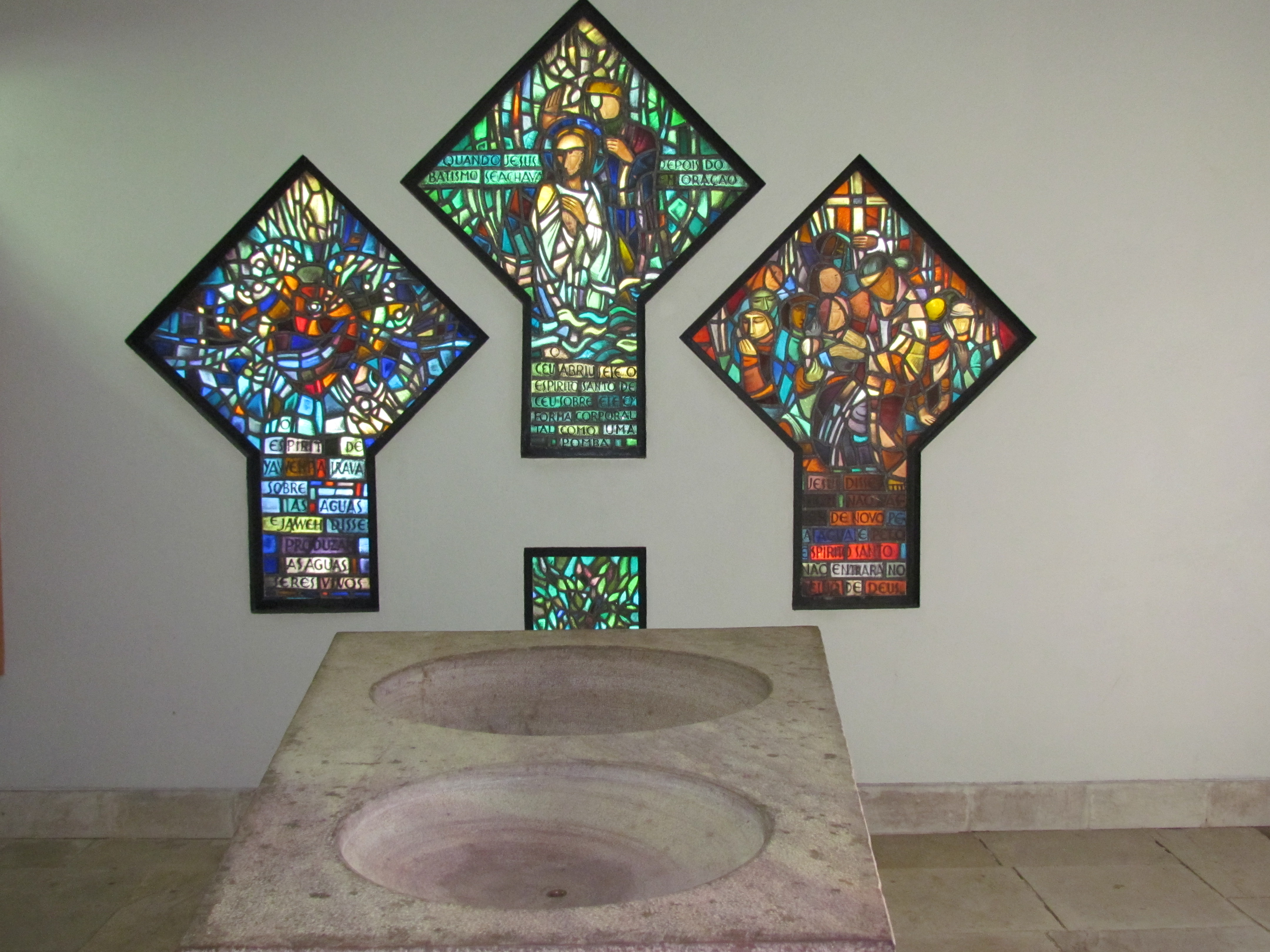 Vitral da Igreja de São Domingos, em São Paulo (SP), Brasil.